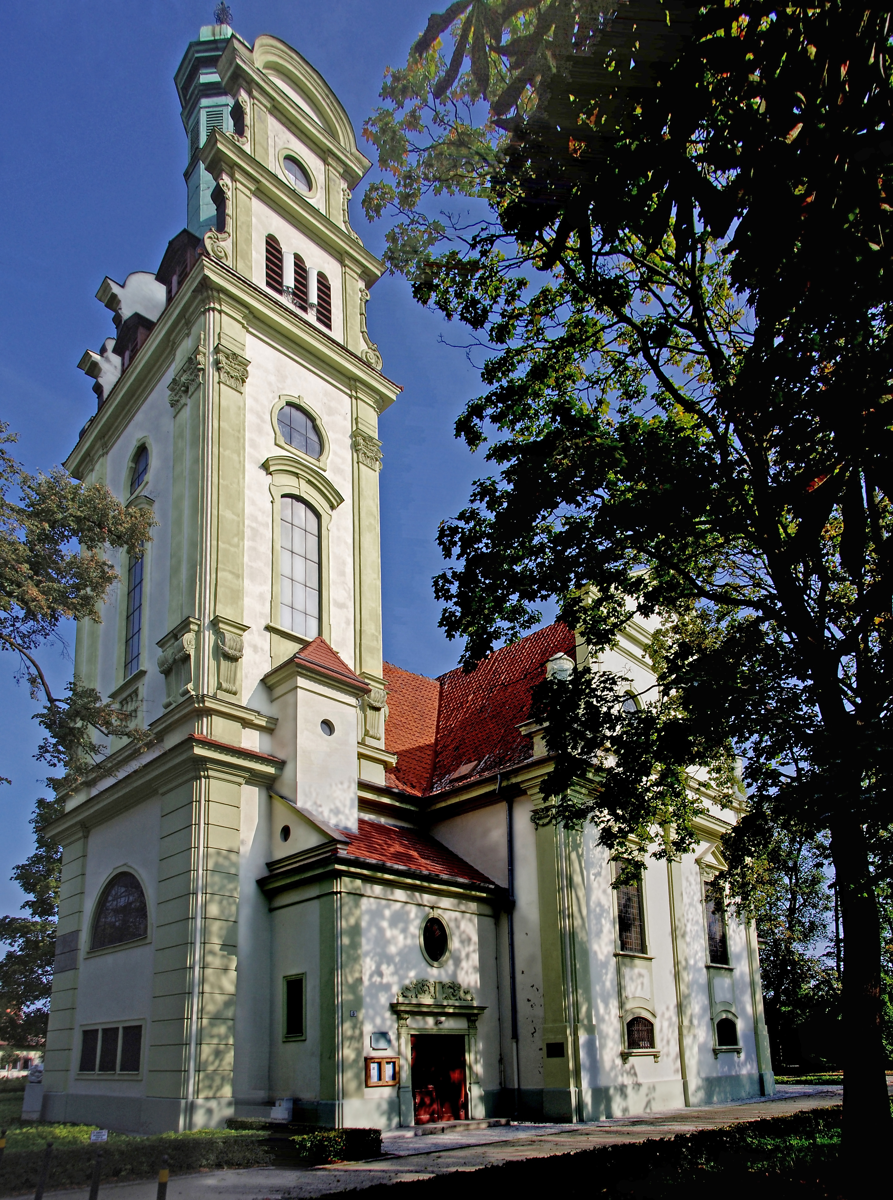 Sopot, ul. Parkowa 5 - Ewangelicko-Augsburski kościół Zbawiciela, 1919.